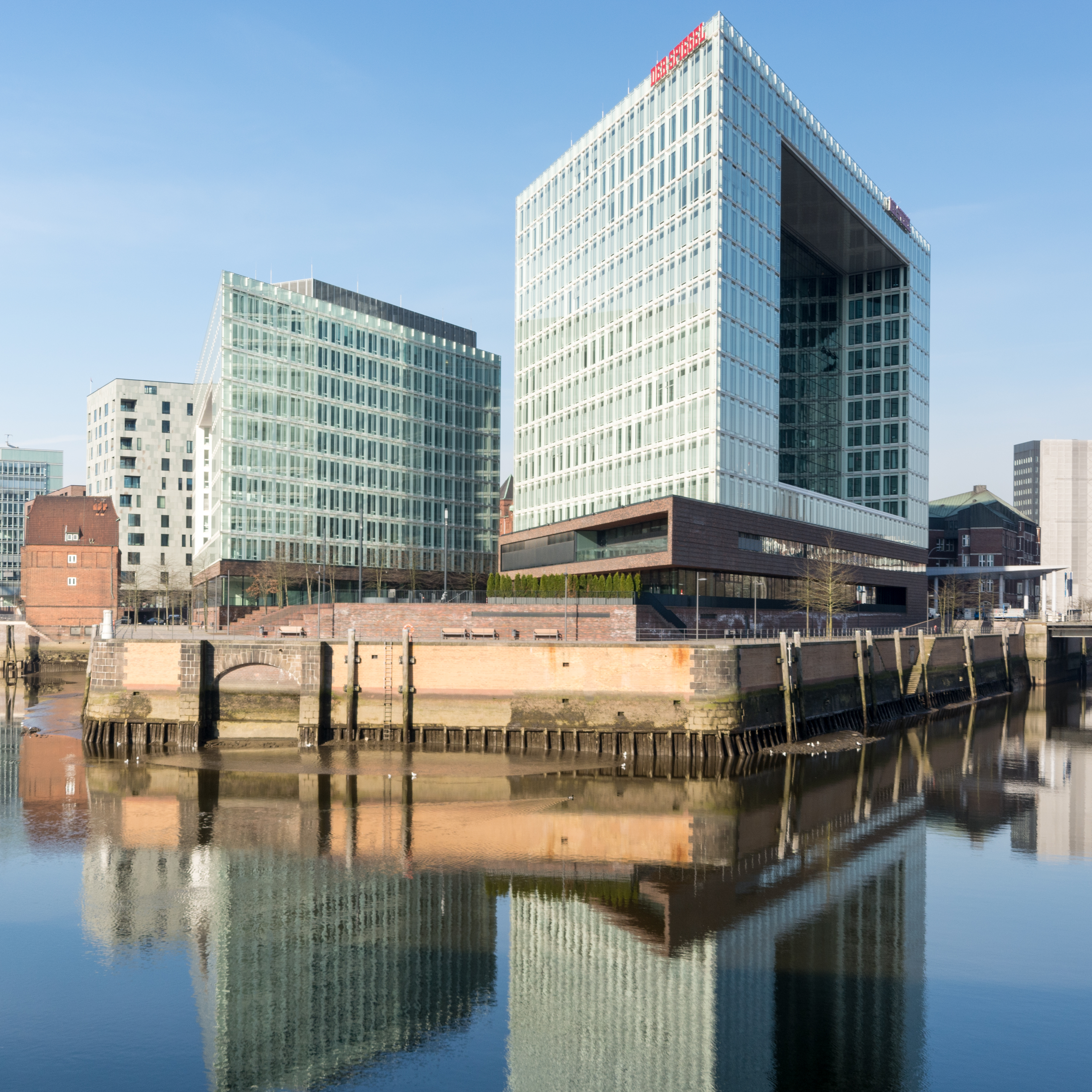 Das Ericushöft an der Mündung des Ericusgrabens in den Zollkanal in Hamburg-HafenCity mit Spiegel-Haus und Ericus-Contor. This is a photograph of an architectural monument.